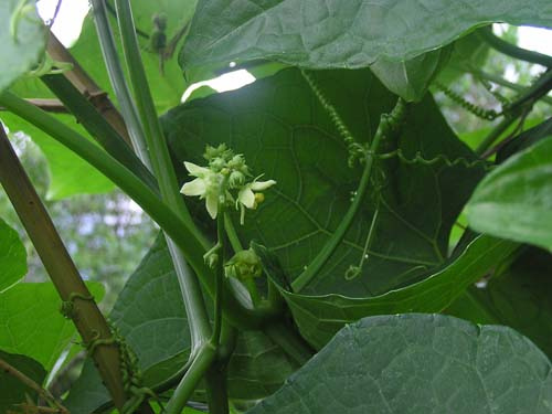 Các loại Cây, Hoa, Trái...